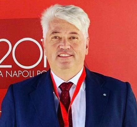 Segretario Generale della FIT CISL CAMPANIA